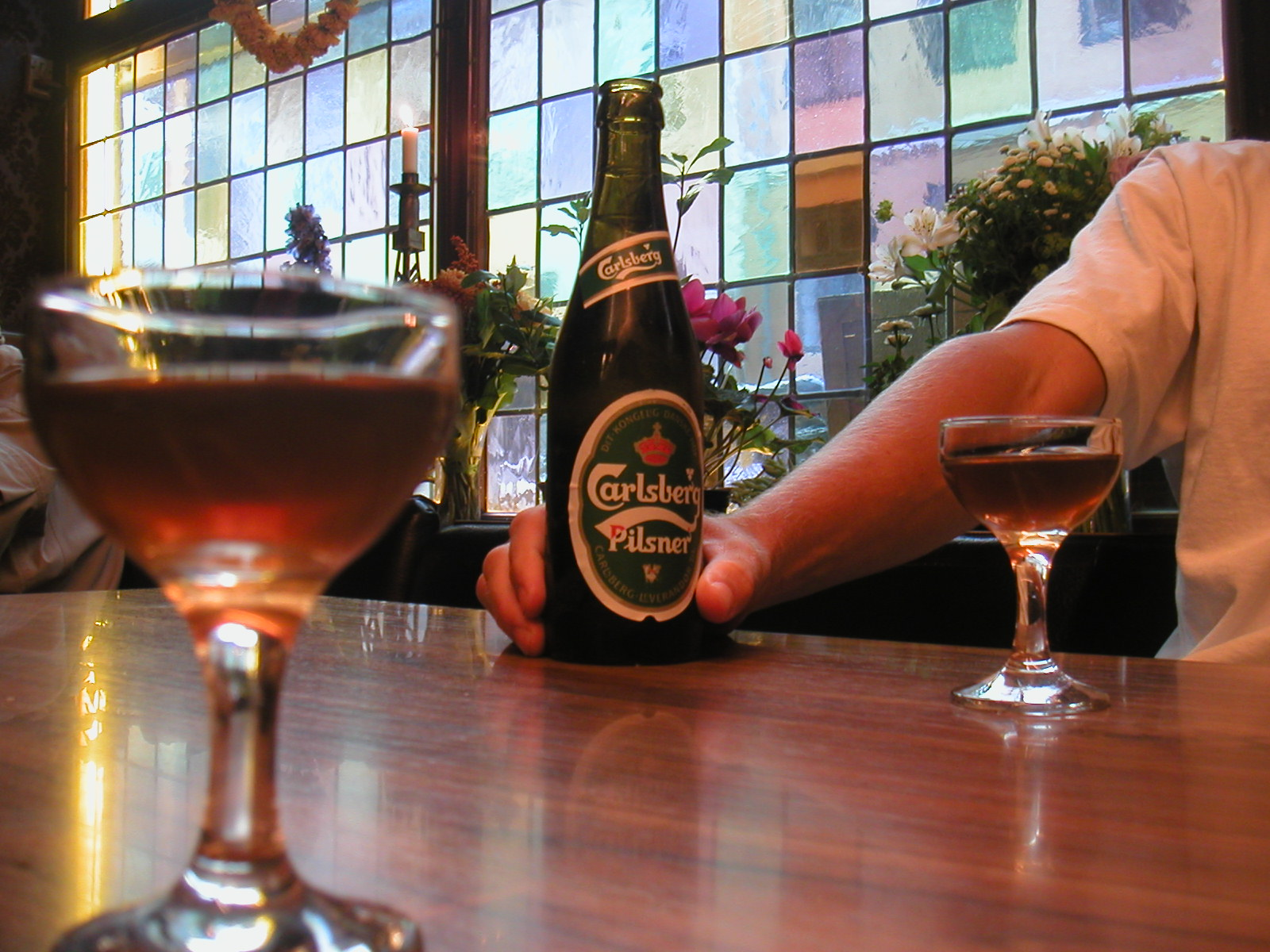 Øl og snaps